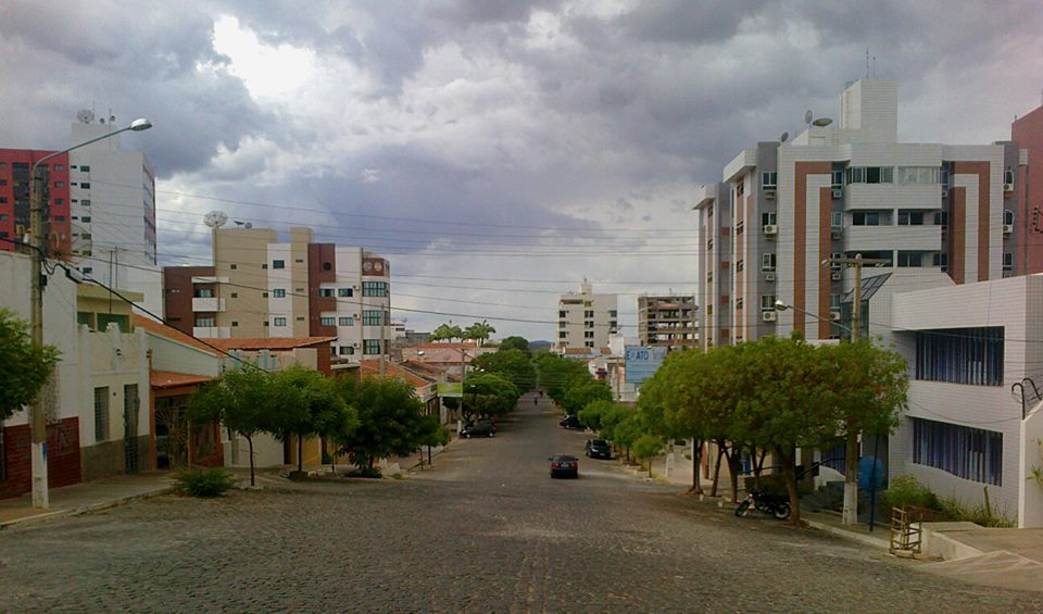 Verticalização decorrente da crescente demanda por residências.